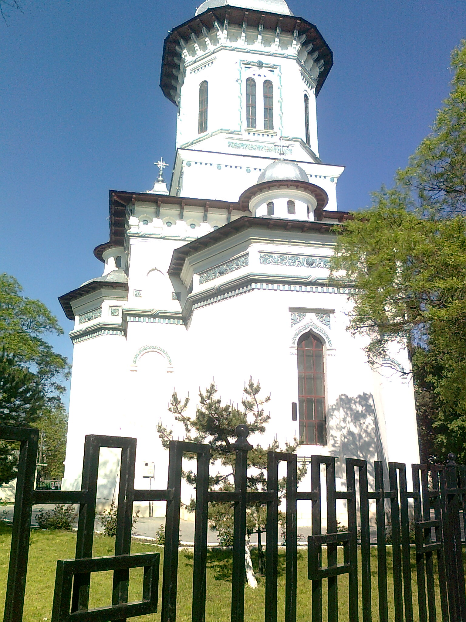 Catedrala ortodoxă Alexandria, România